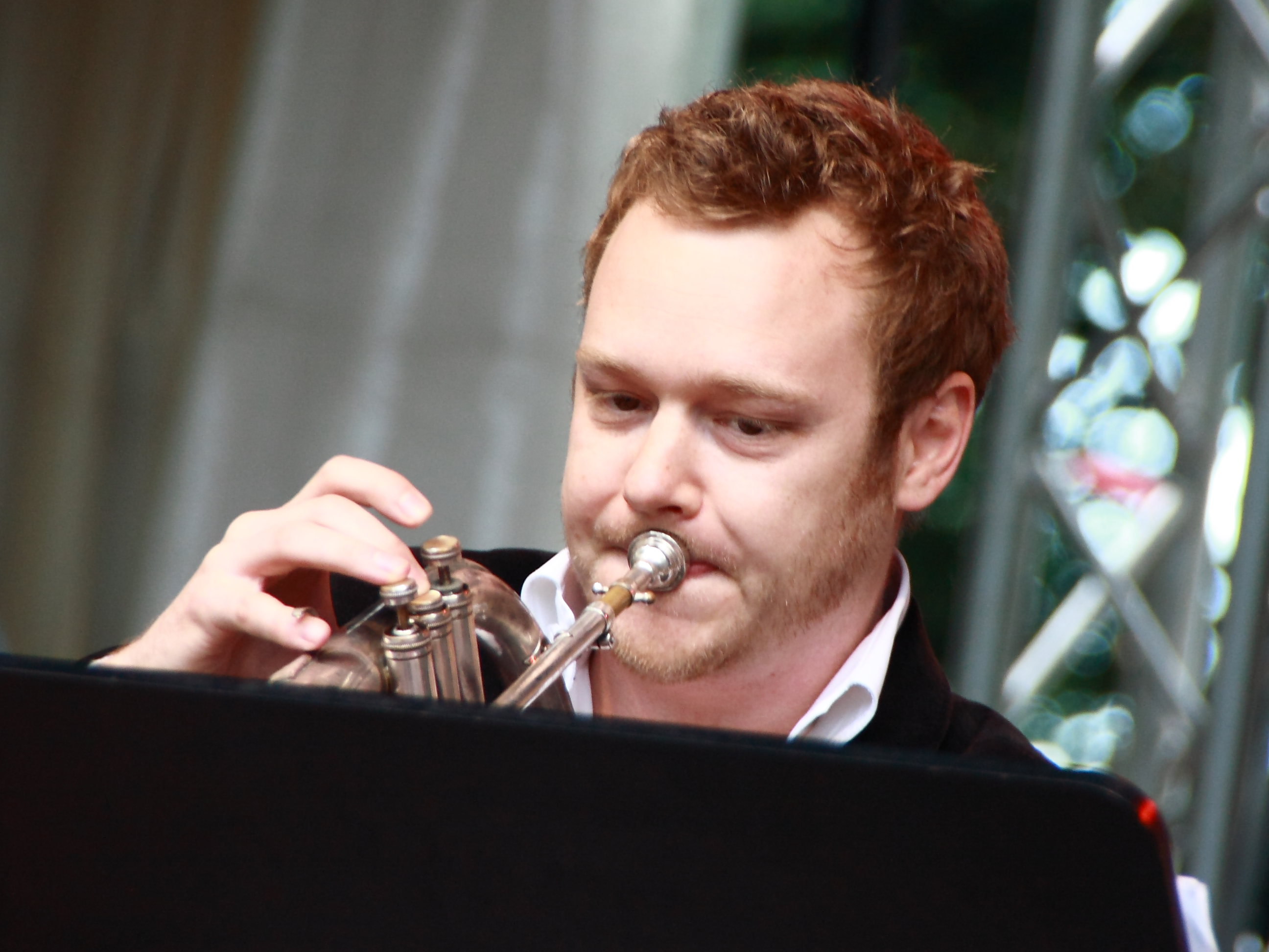 Martin Eberle mit Die Strottern auf dem TFF Rudolstadt 2012.